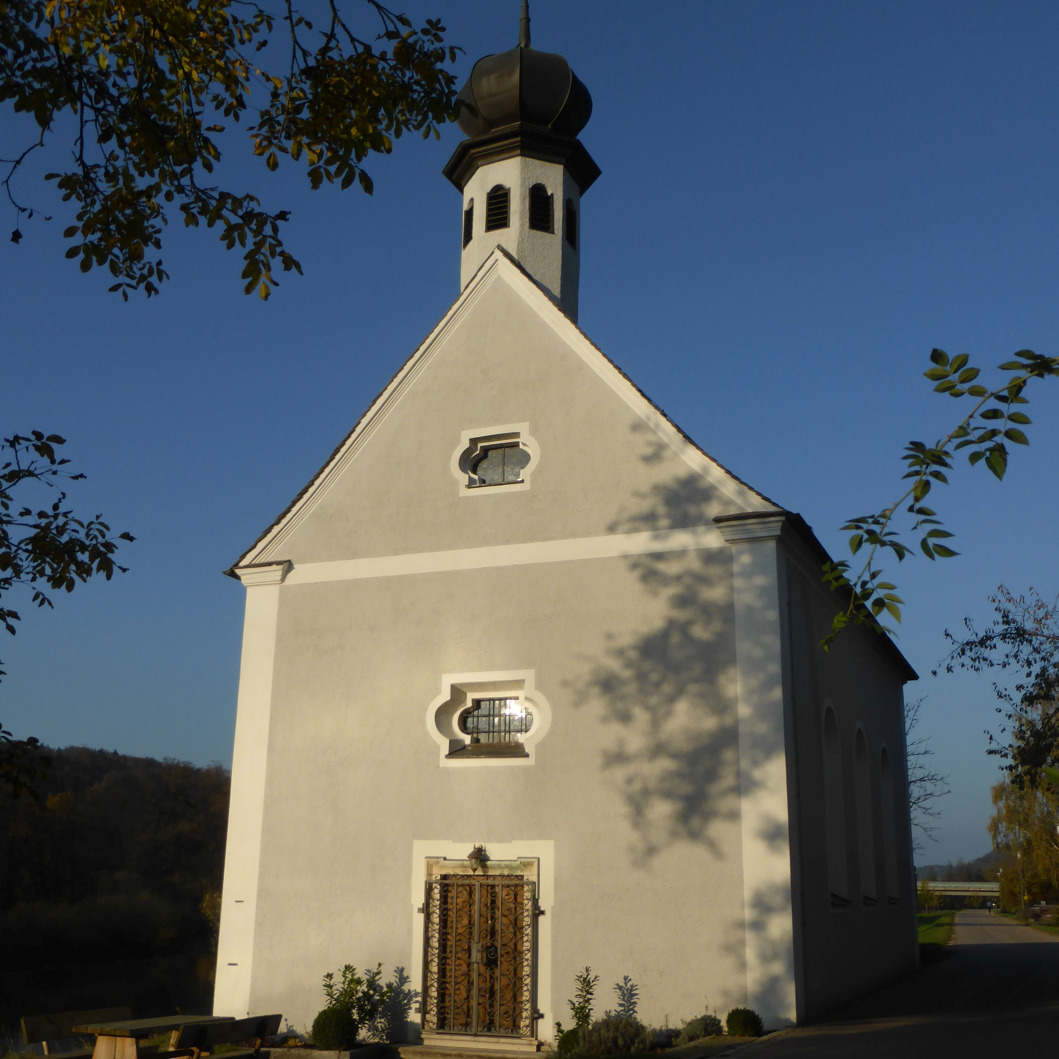 Heitzenhofen (Kirche-Sankt-Wolfgang)